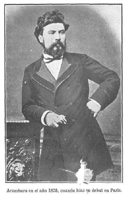 Aramburu en el año 1875, cuando hizo su debut en París